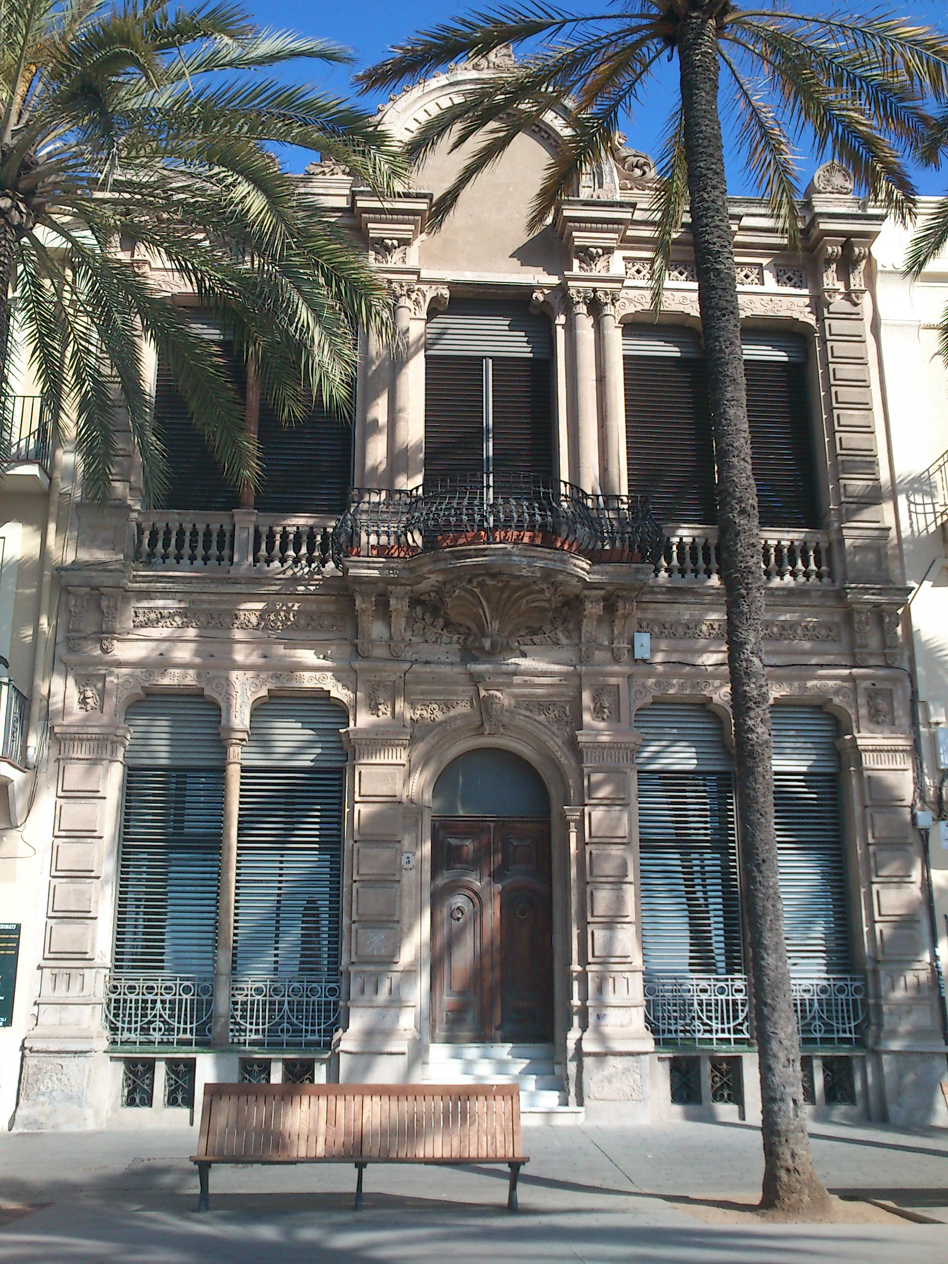 Casa situada a la Rambla de Badalona.